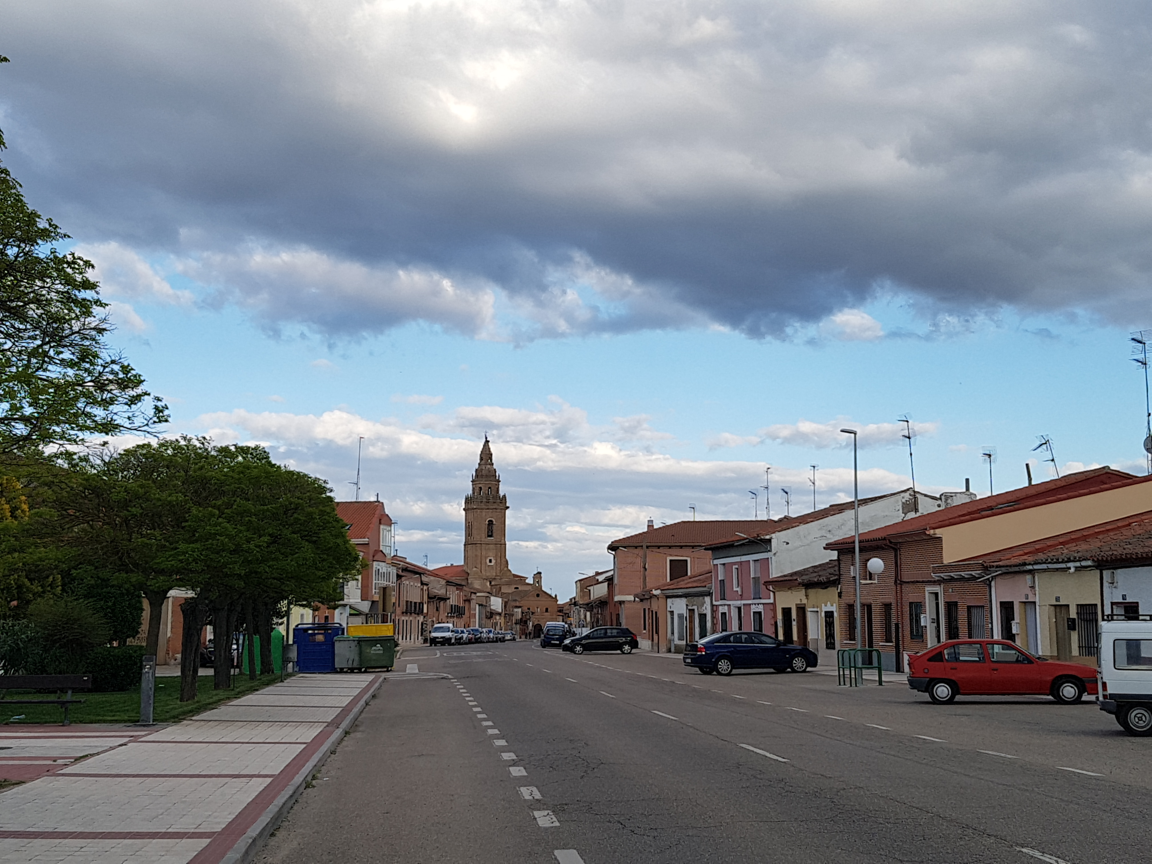 V Feria de los Oficios y Mercado Castellano de Nava del Rey